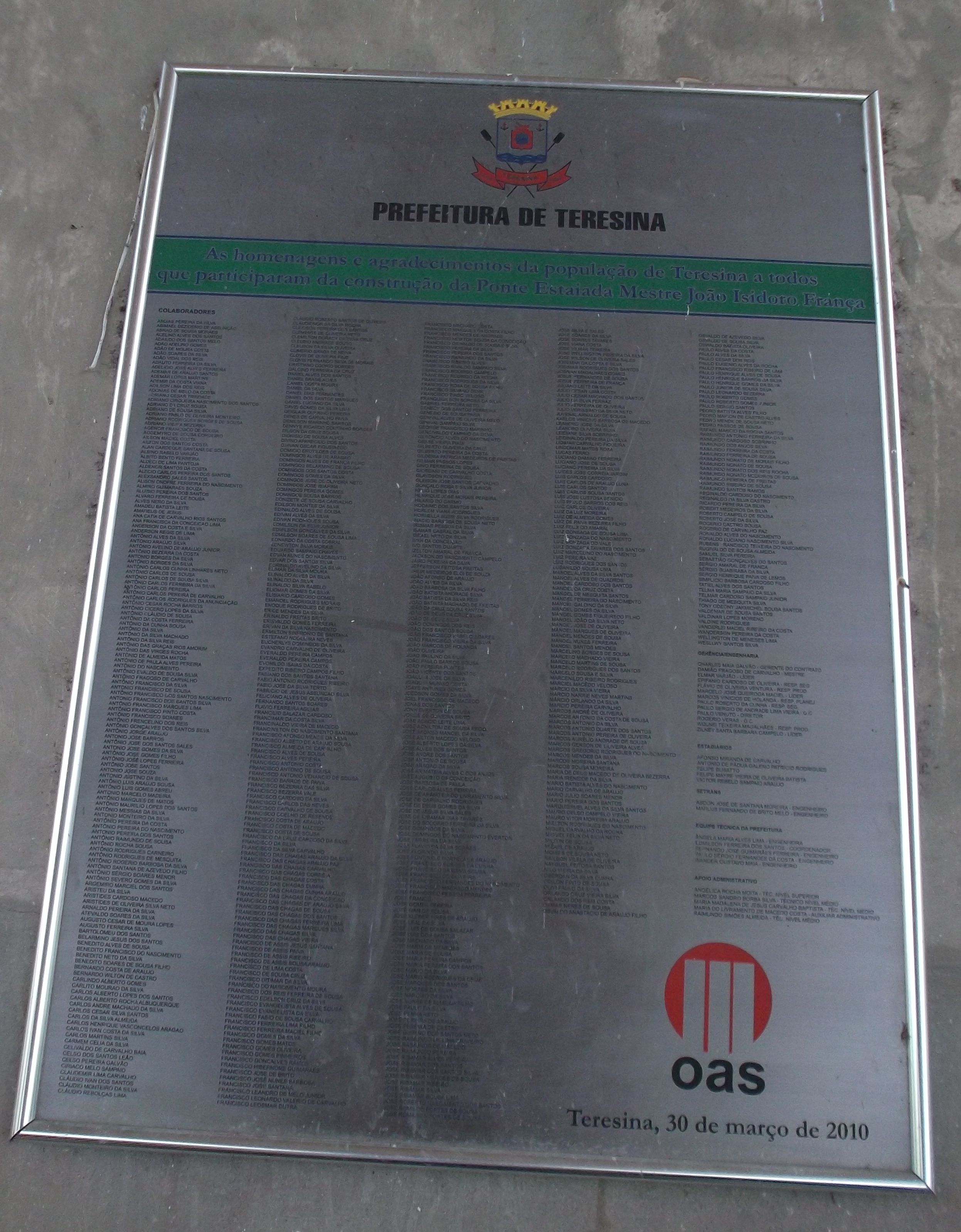 Placa com a relação de operários que construíram a ponte estaida João Isidoro de França, em Teresina.